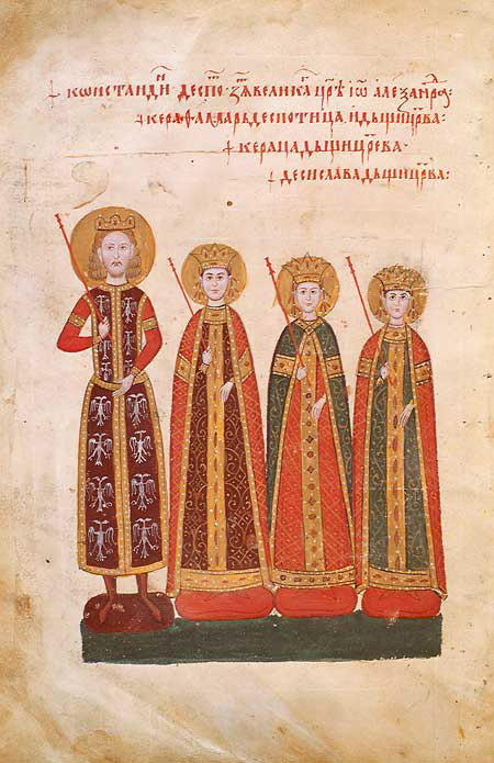 Деспот Константин, Кера Тамара Българска, Кераца Българска и Десислава Българска. Миниатюра от Лондонското евангелие на Иван-Александър